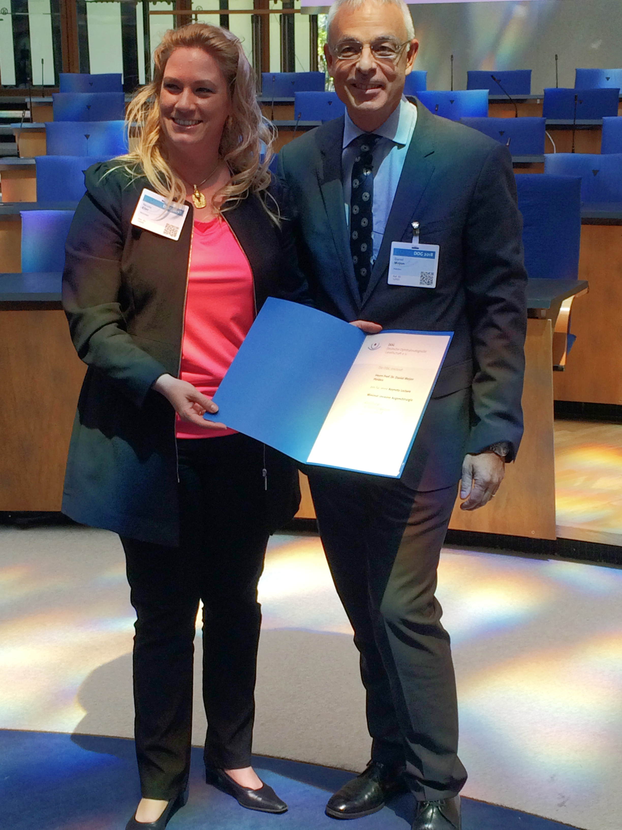 Daniel Mojon mit der Präsidentin der DOG, Prof. Dr. Nicole Eter, anläßlich seiner Keynote Lecture, Bonn 2018